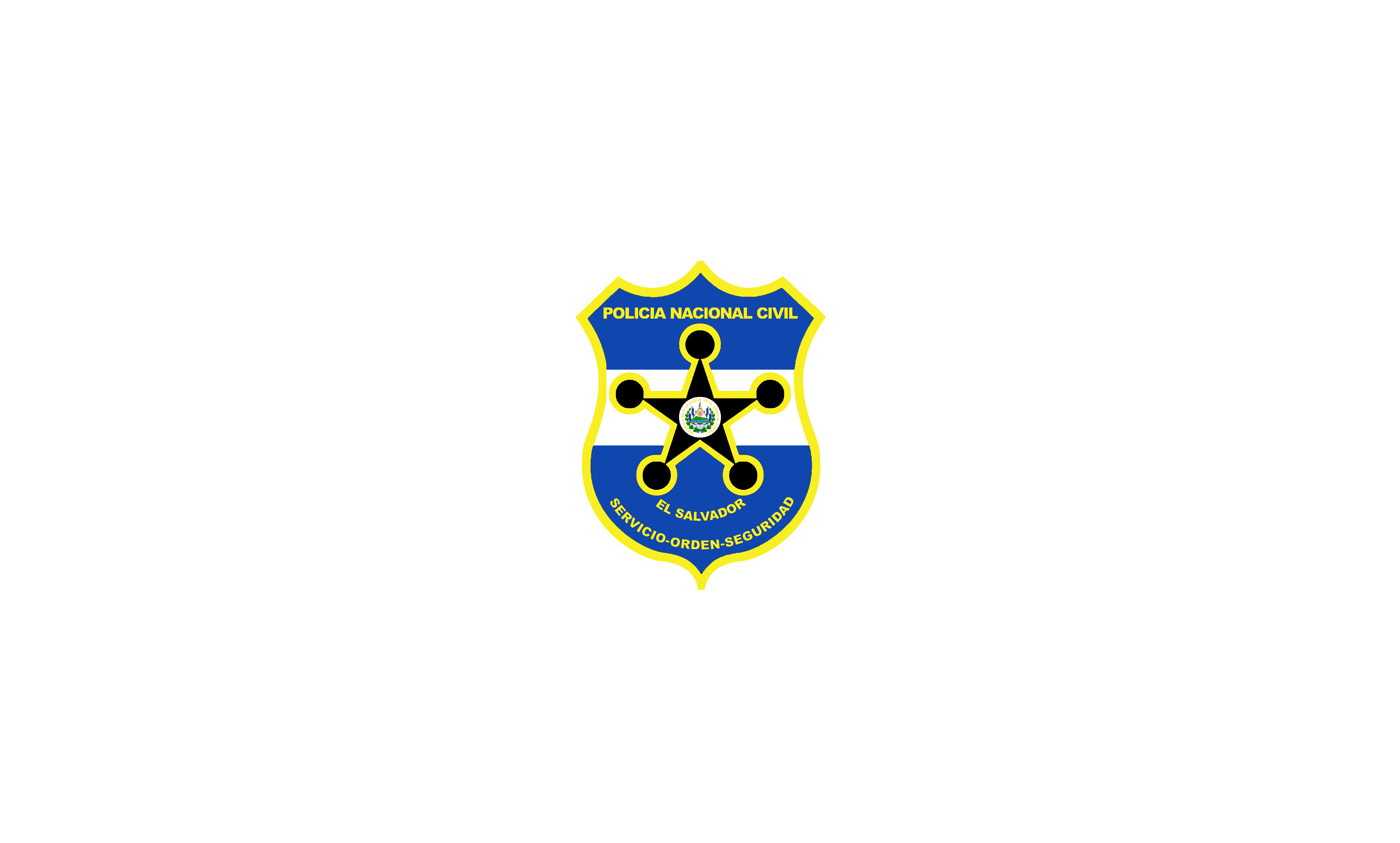 Bandera de la Policía Nacional Civil de El Salvador